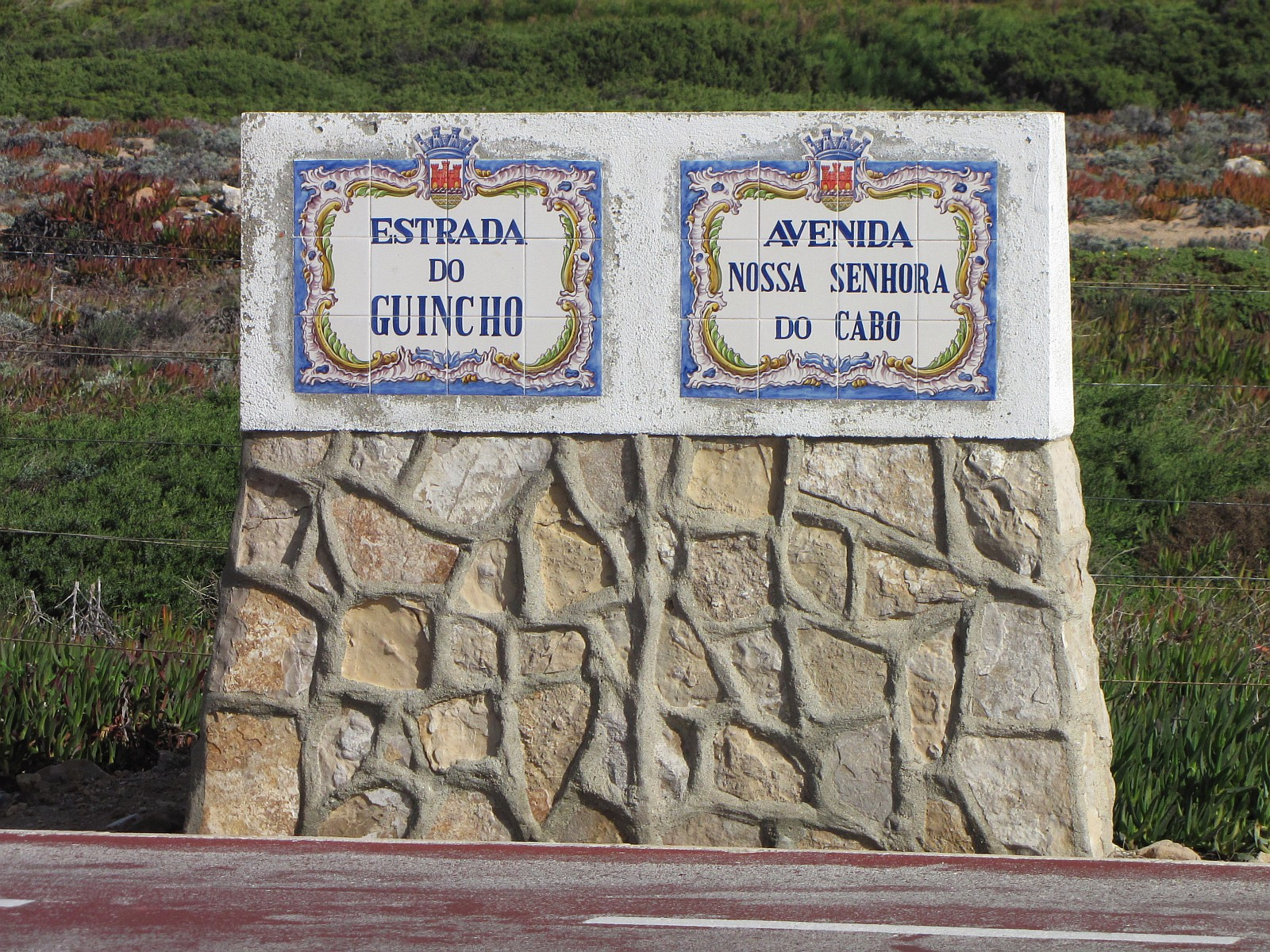 Leuchtturm von Cabo Raso erreichbar über die N 247 von Norden (Cabo da Roca): Estrada do Guincho, von Osten (Cascais/Estoril): Avenida Nossa Senhora do Cabo - Portugal Foto Wolfgang Pehlemann Steinberg/OstseeIMG_8611